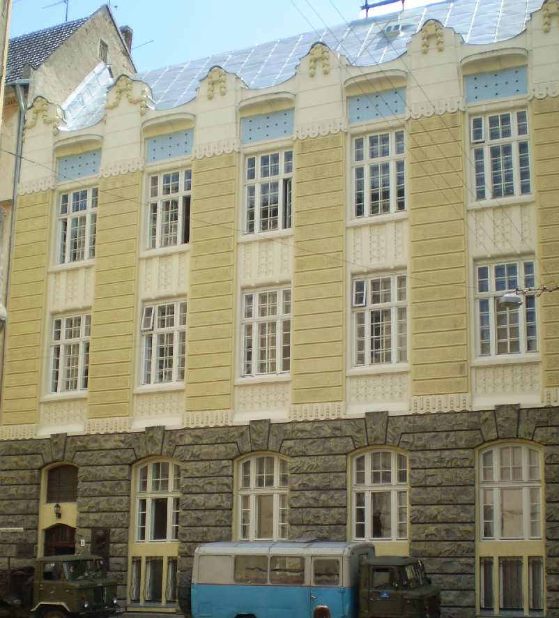 Львівська державна музична академія Lviv music academy